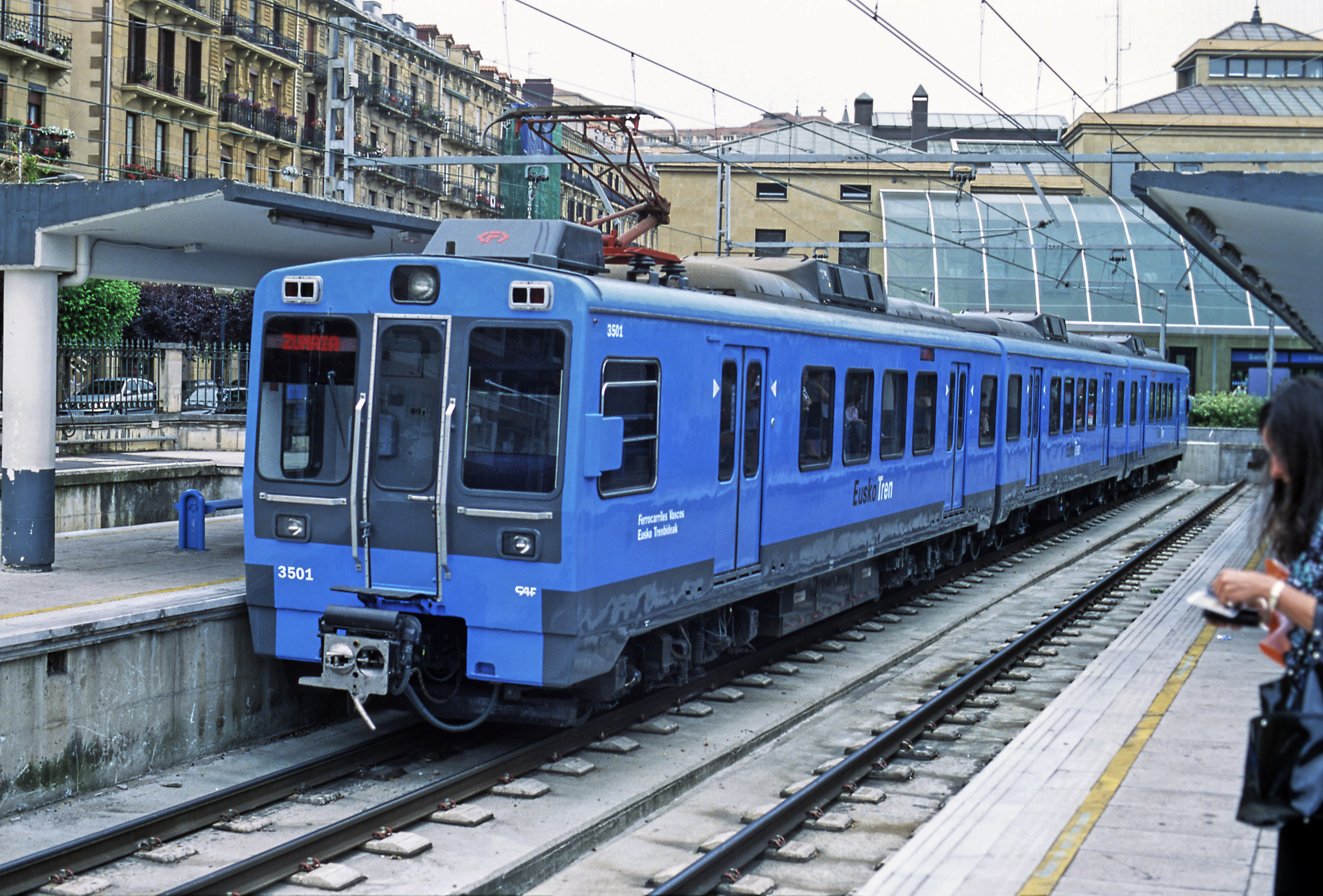 Bei den Wagen der FV/ET fällt die äußerliche Verwandtschaft zu den breitspurigen 440 der Renfe besonders auf.